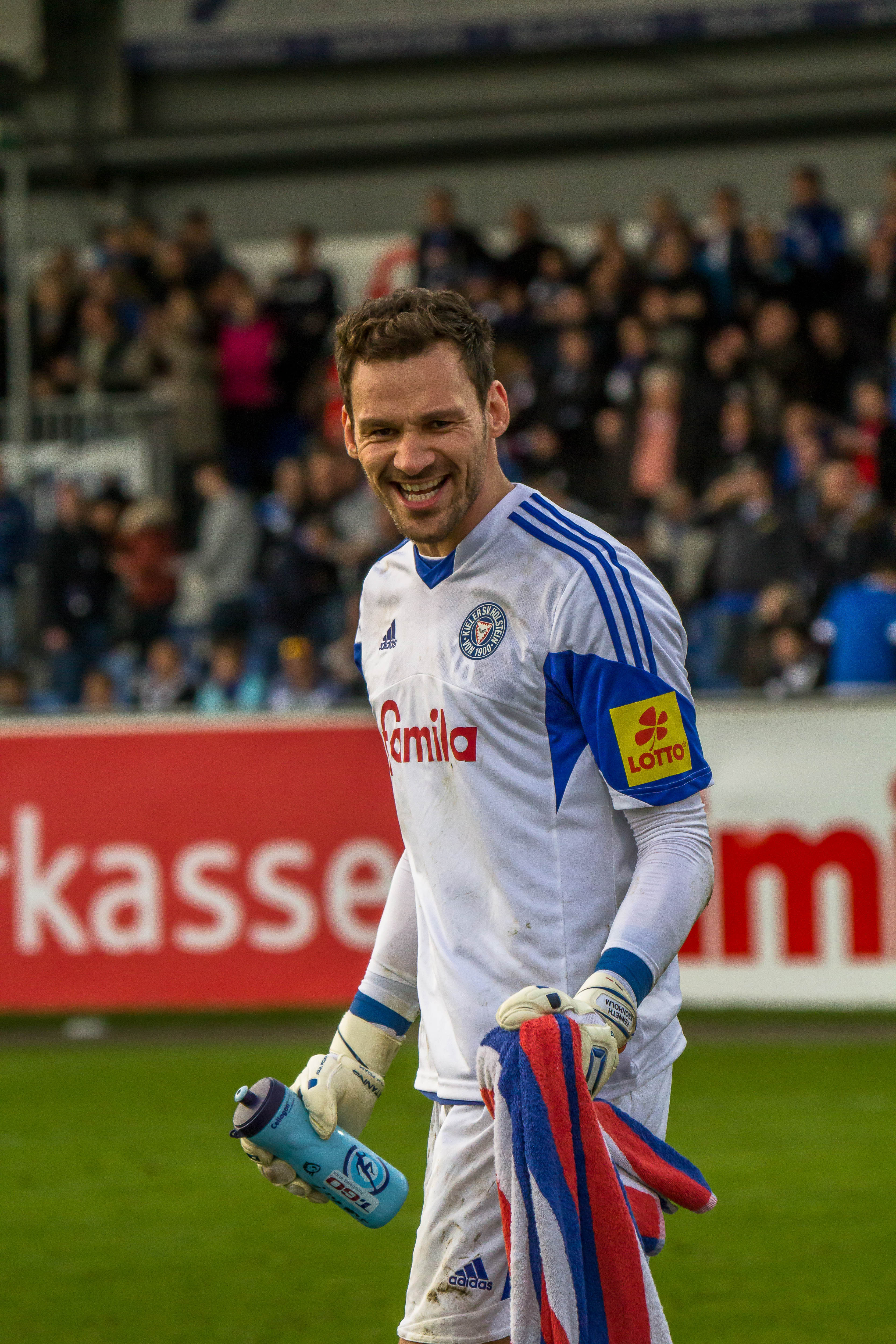 Torhüter Kenneth Kronholm, Holstein Kiel